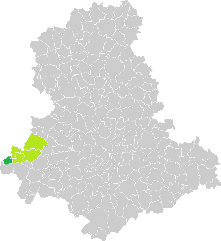 Carte de situation de la commune des Salles-Lavauguyon (en vert foncé) dans le votre Canton (en vert clair) sur une carte des communes de la Haute-Vienne